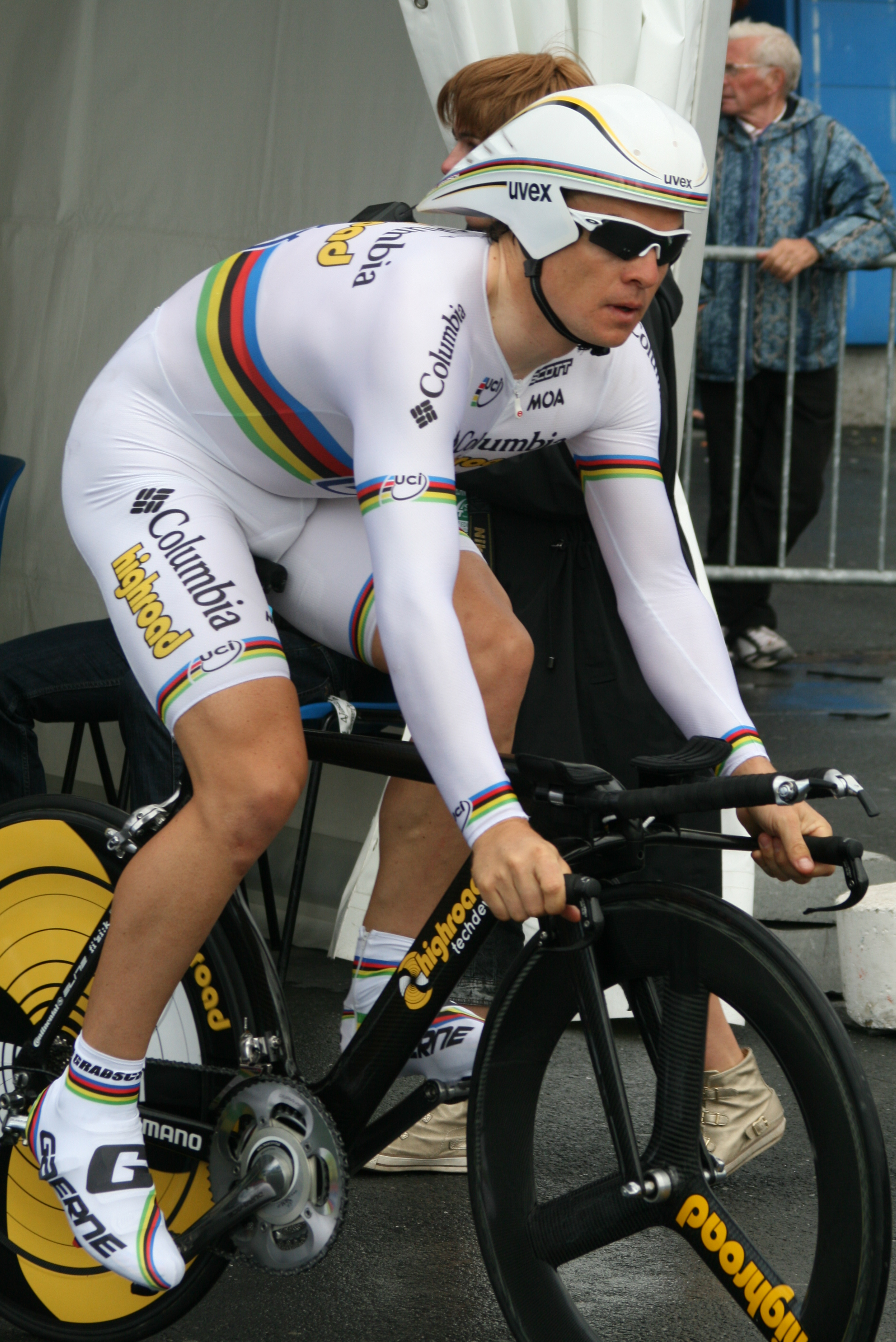 Grabsch Bert Grabsch lors des Quatre jours de Dunkerque 2009